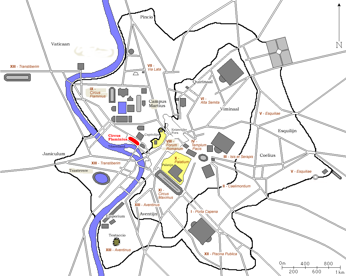 Kaart van antiek Rome waarop het Circus Flaminius is uitgelicht. Kaart is afkomstig van FR:wiki en door mij naar een Nederlandse versie bewerkt. Auteurs: nl::fr:User:ColdEel en Gebruiker:Joris1919